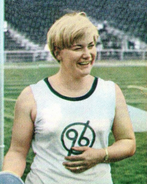 CAMPIONI dello SPORT 1968/69-n.29- WESTERMANN - ATLETICA LEGGERA